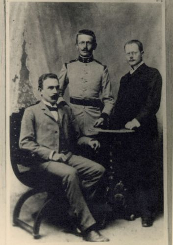 Oton Župančič pri vojakih v Gradcu, poleg Ivo Šorli in lekarnar Karba.